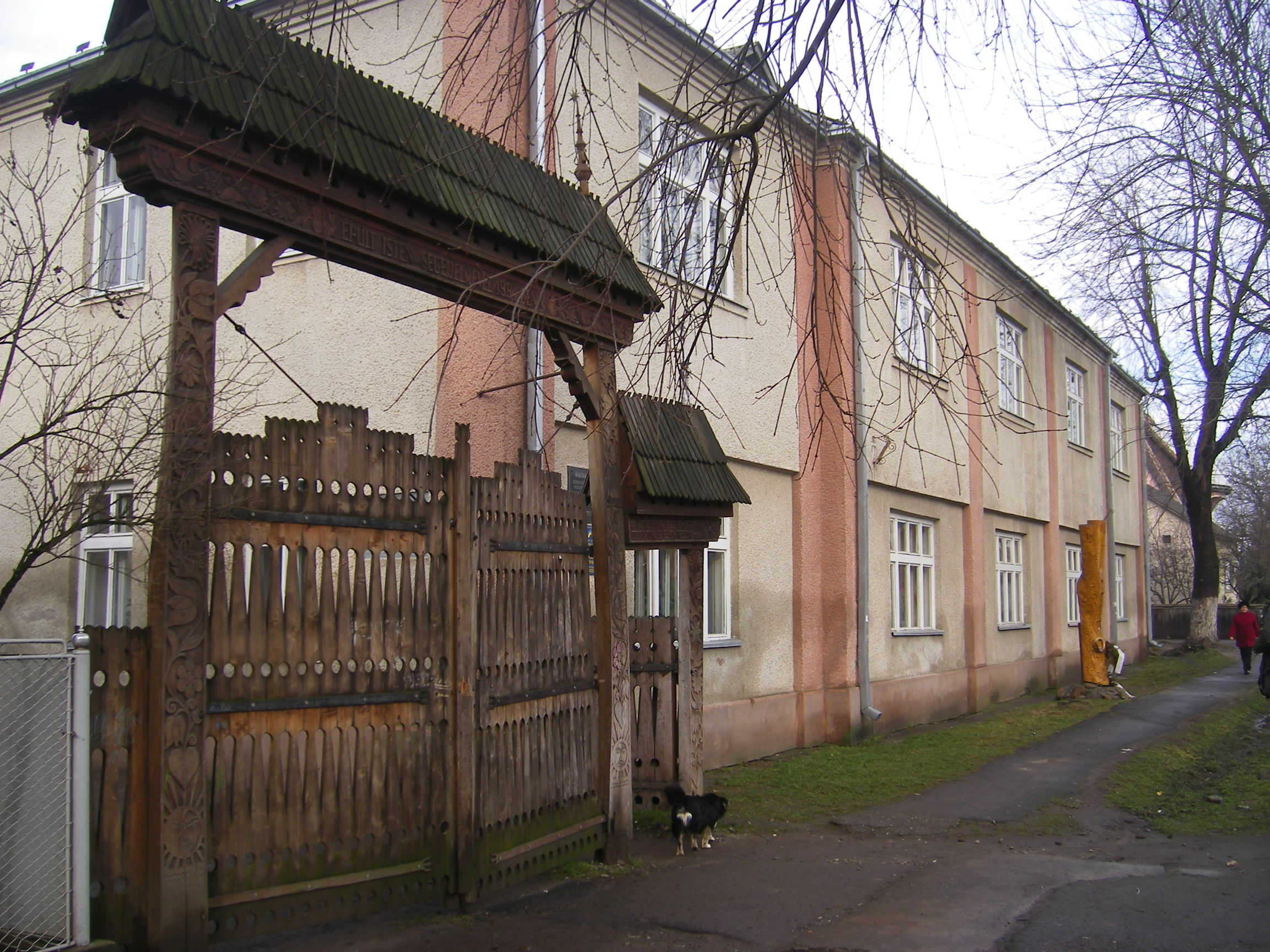 Visk (Vyshkovo) Hungarian Gymnasium